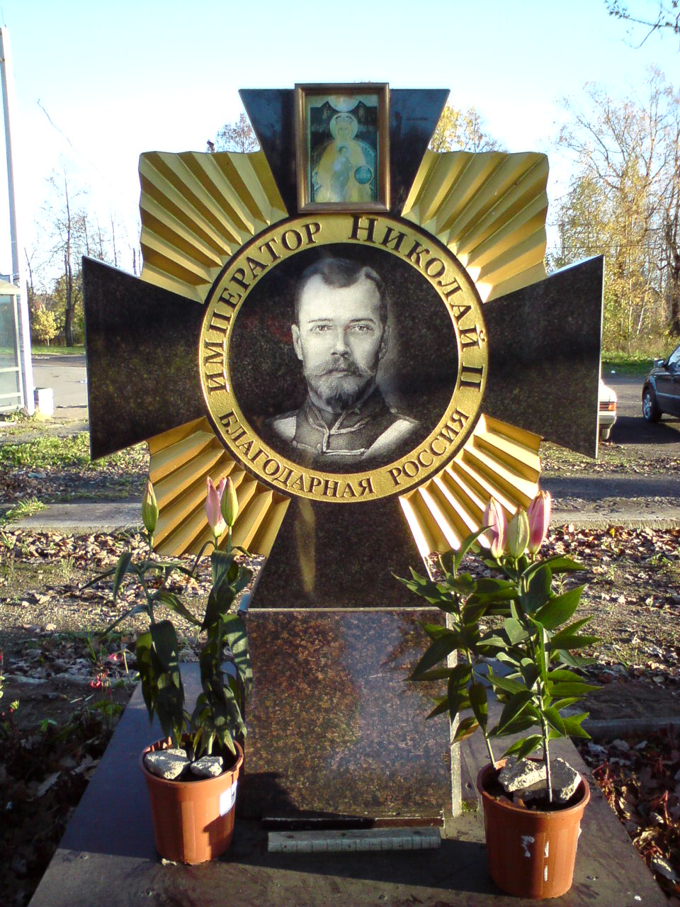 Памятный крест на месте разрушенной часовни в посёлке Александровская. Фото 2011 года. Автор фото - Алексей Лупашевский. По его письменной просьбе фото загрузил Участник:Леонид Григорьевич